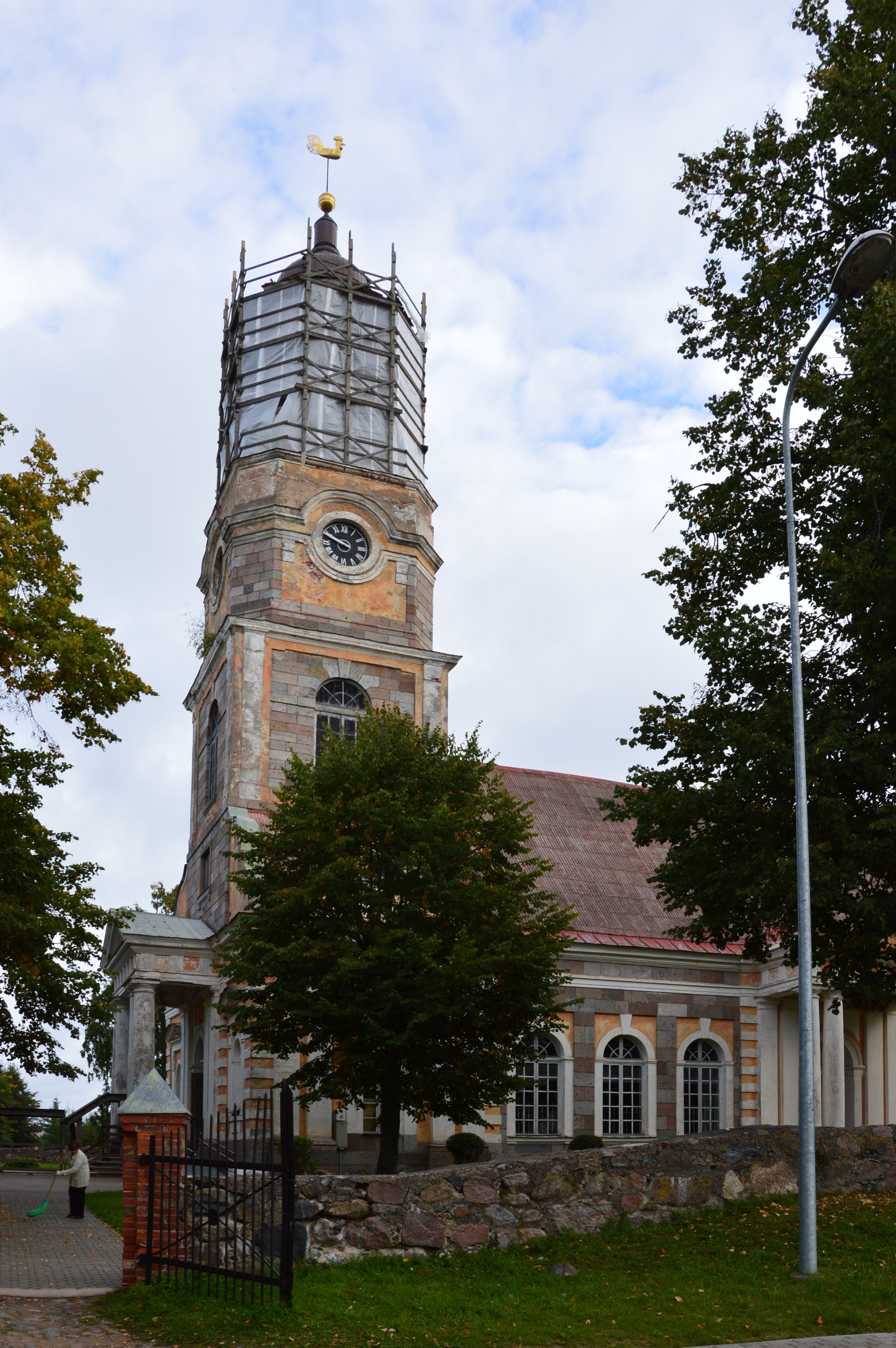 Aluliina (Alūksne) luteri kirik